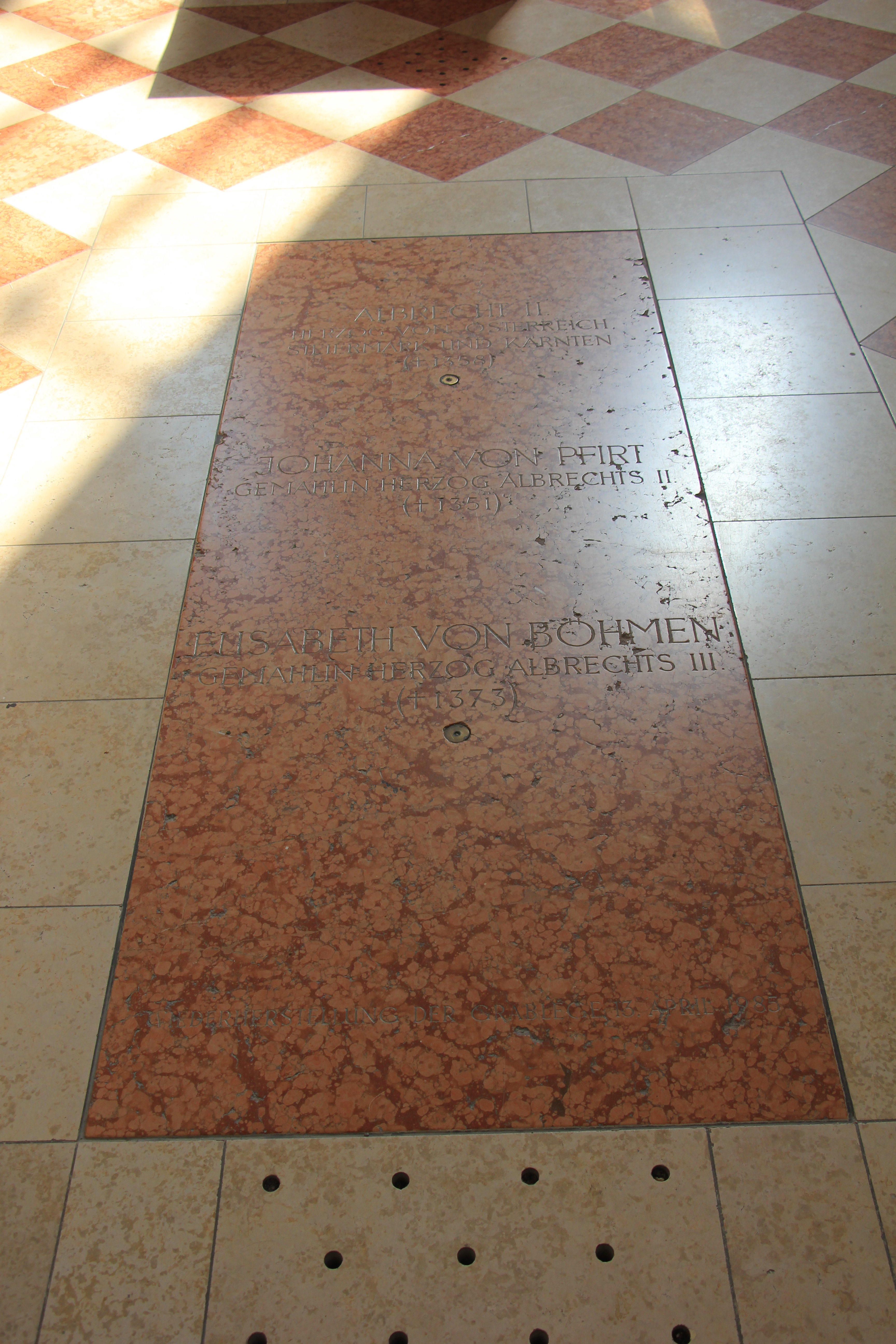 Inneres der Kirche der Kartause Gaming